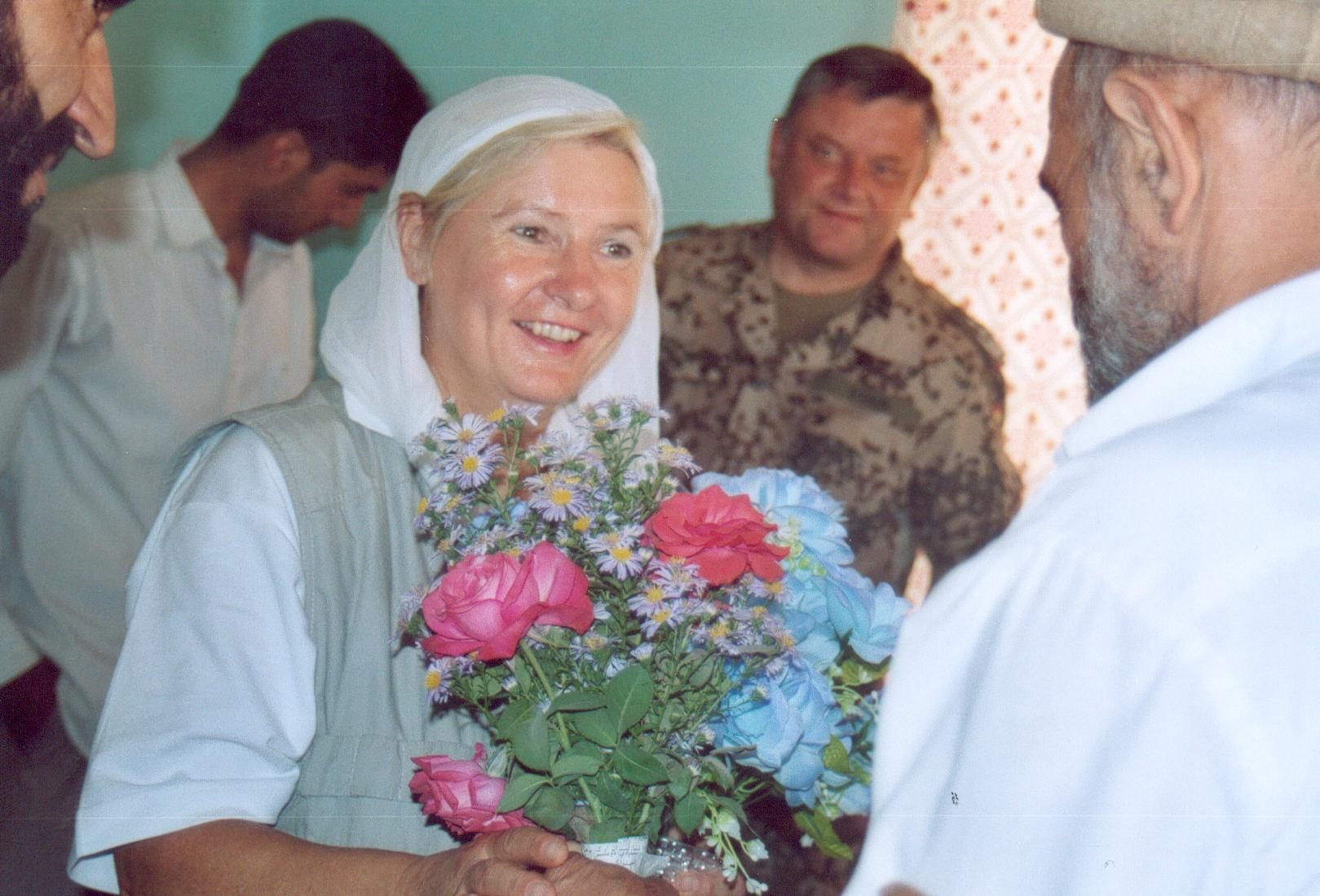 Sybille Schnehage während einer Ehrung mit General Stier in Kunduz